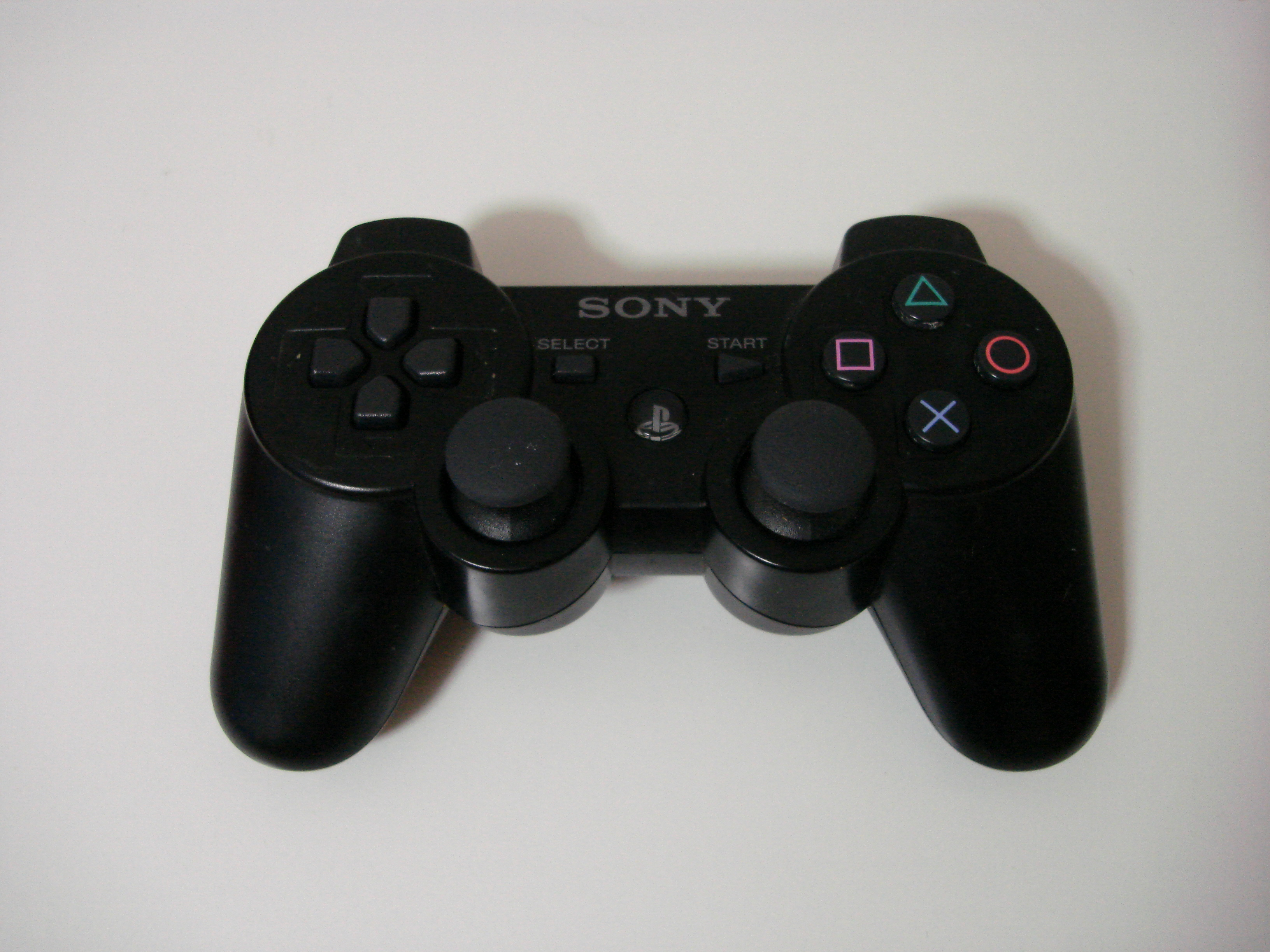 PLAYSTATION controller SIXAXIS